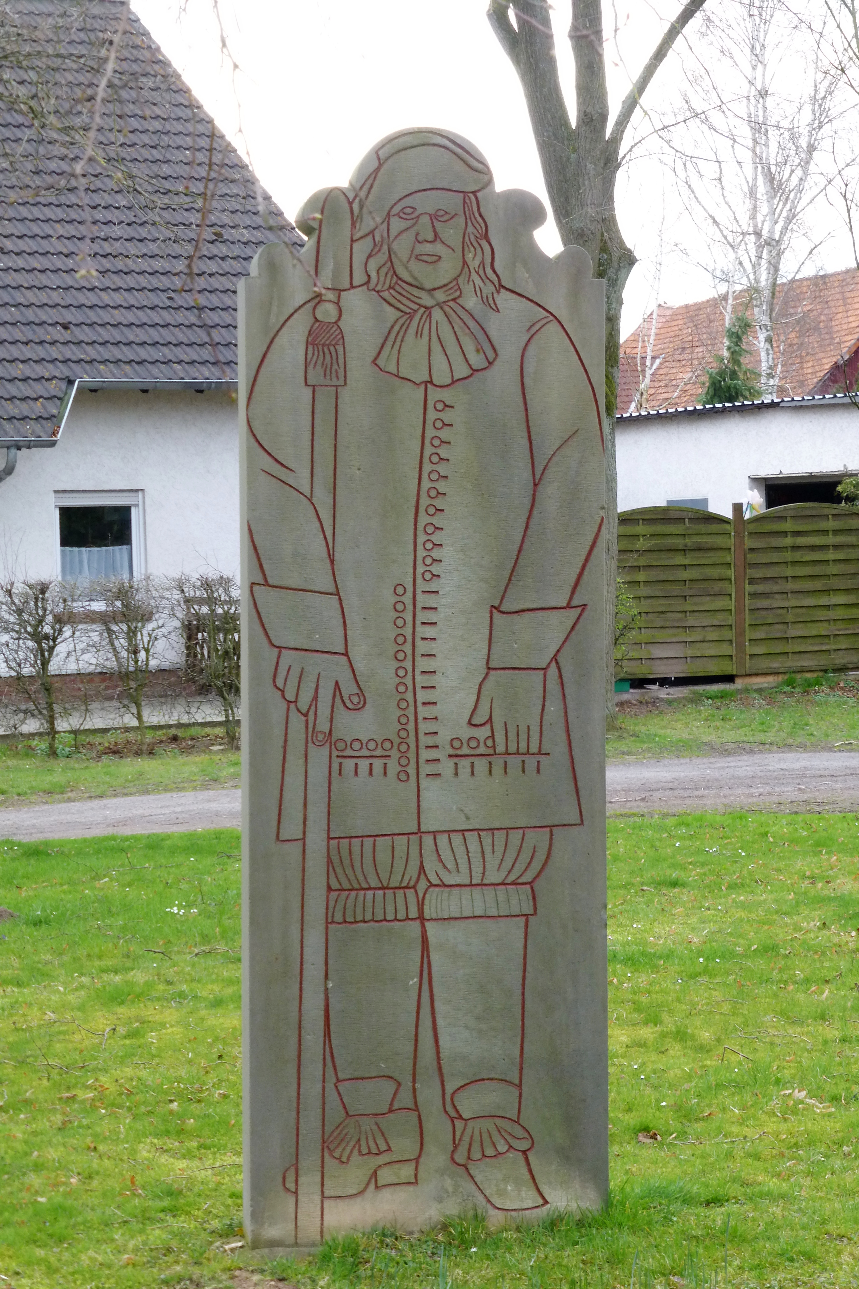 Gedenkstein für Christoffel Münster (1632–1676) mit Darstellung des 2,48 m großen herzoglichen Leibwächters in Lebensgröße